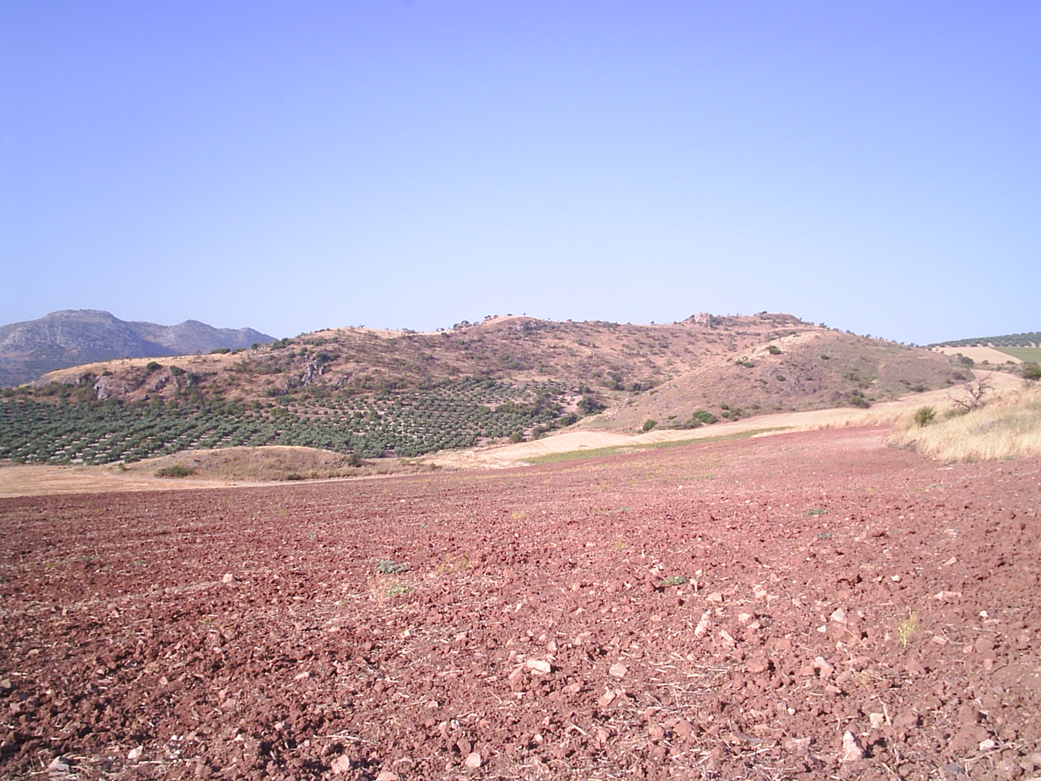 Vista del Cerro de los Castillejos desde el Norte